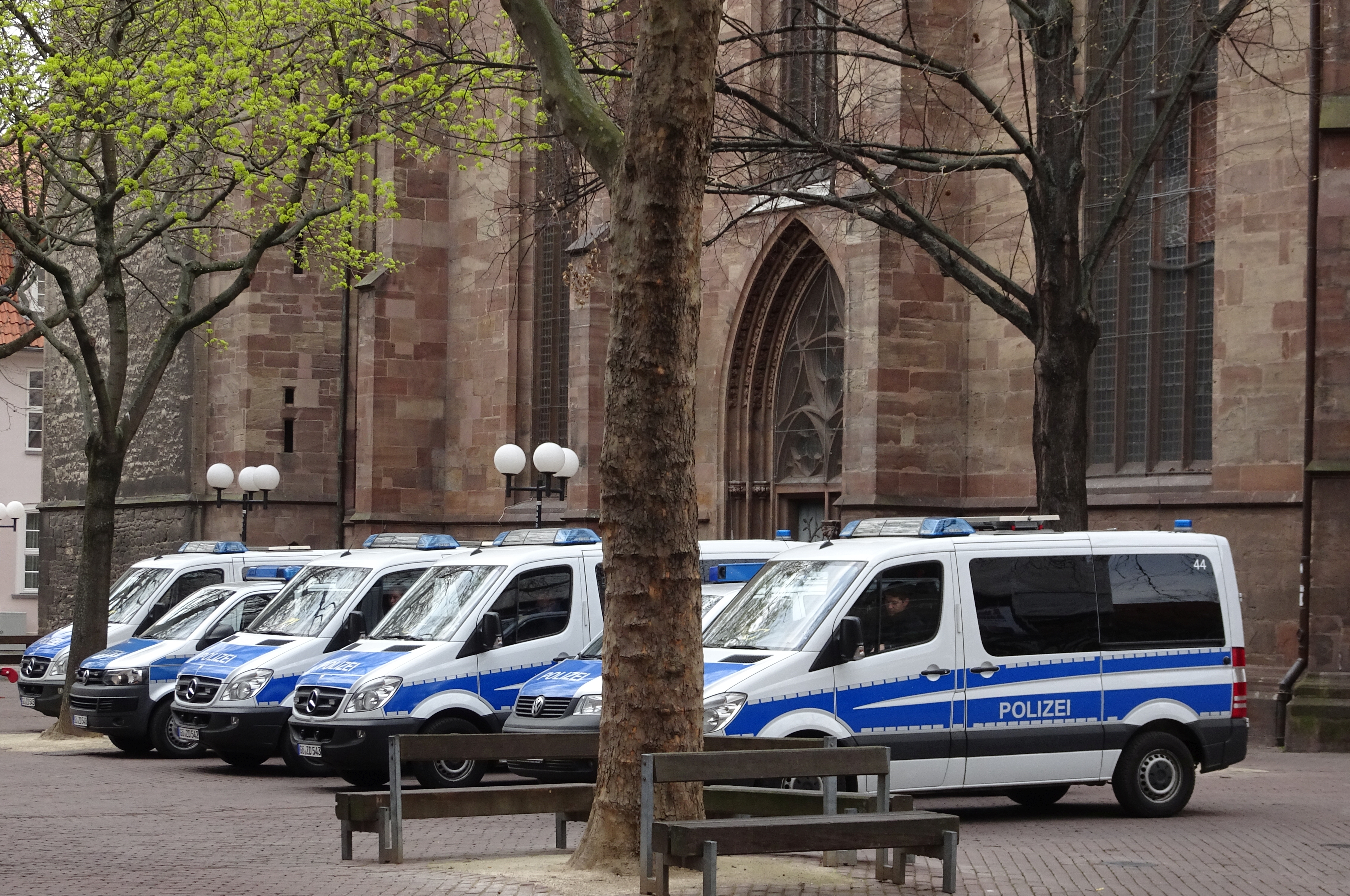 Fahrzeuge der Beweissicherungs- und Festnahmeeinheit Göttingen